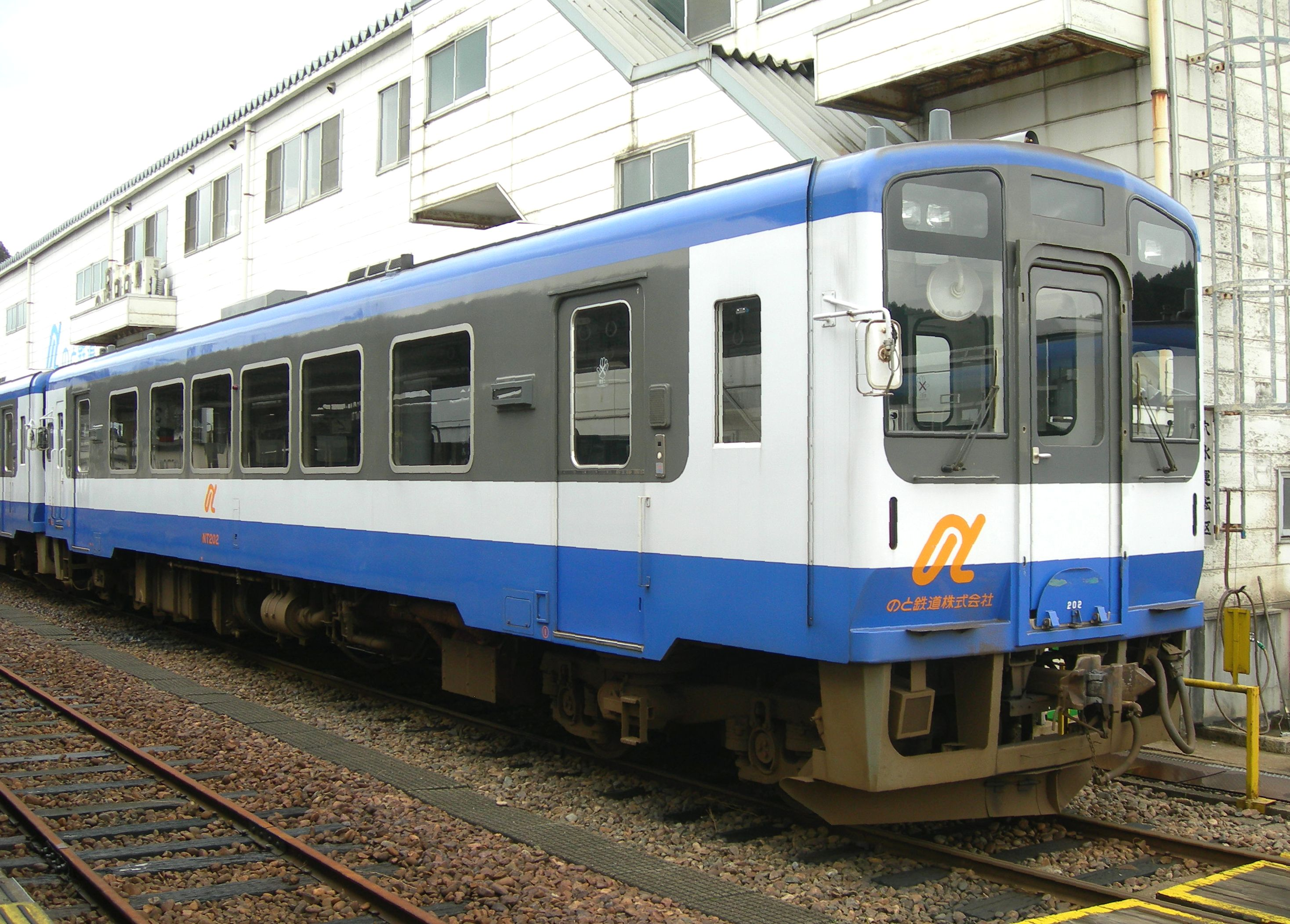 のと鉄道NT200形気動車 穴水駅で撮影